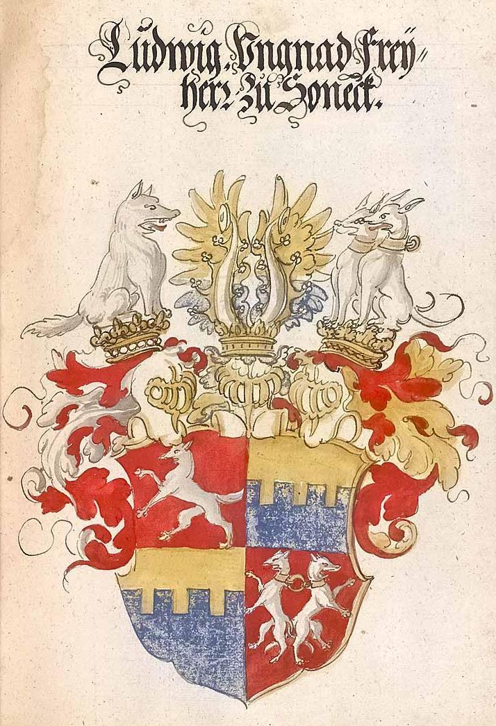 Wappen Ludwig Ungnad zu Soneck aus einem unbekanntem Wappenbuch